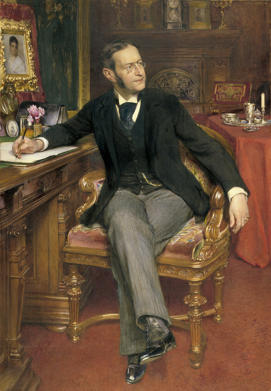 Bildnis des Ernst Mendelssohn-Bartholdy in seinem Arbeitszimmer.